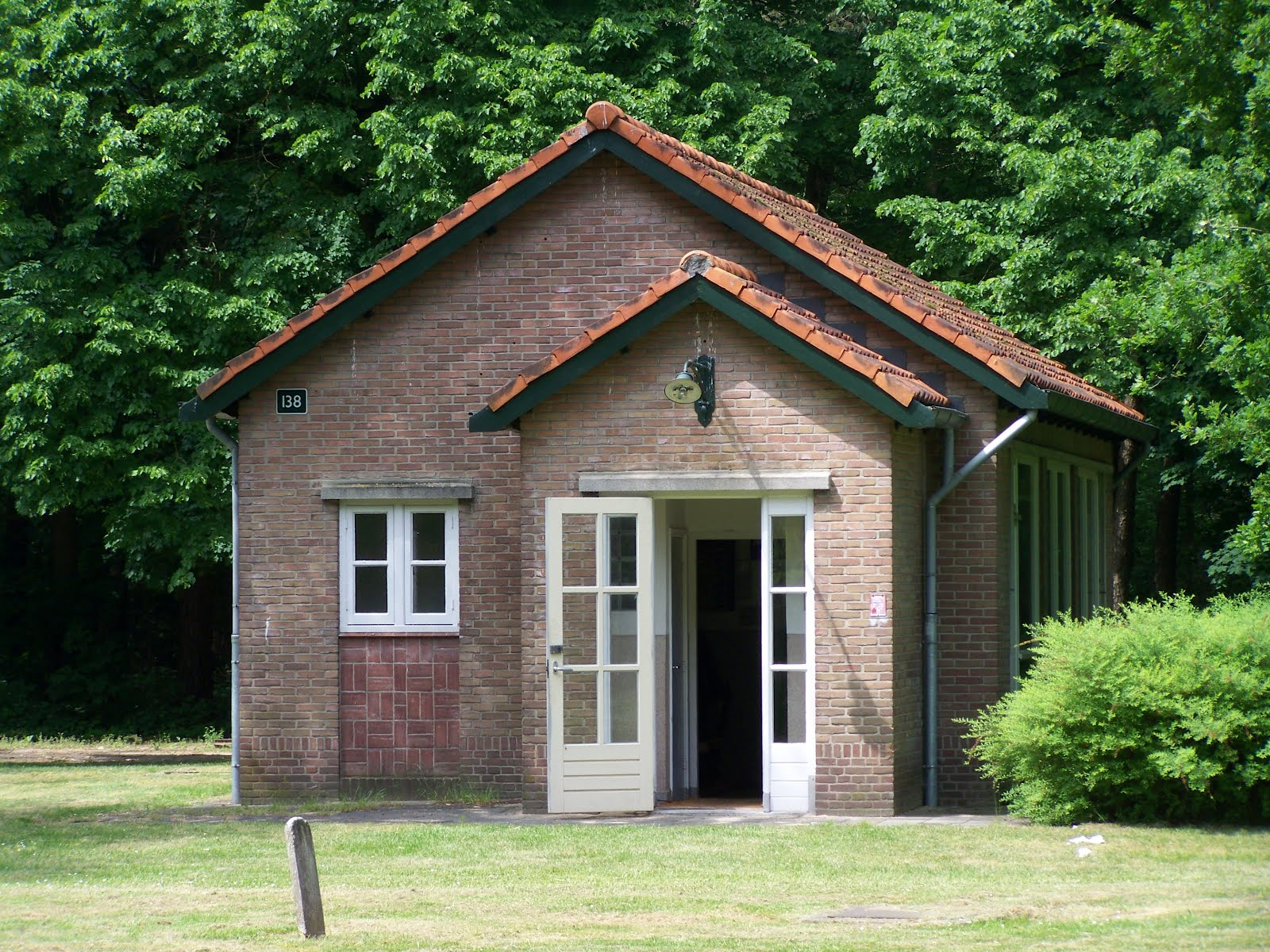 Museumpark Harskamp, Spoorwegmuseum